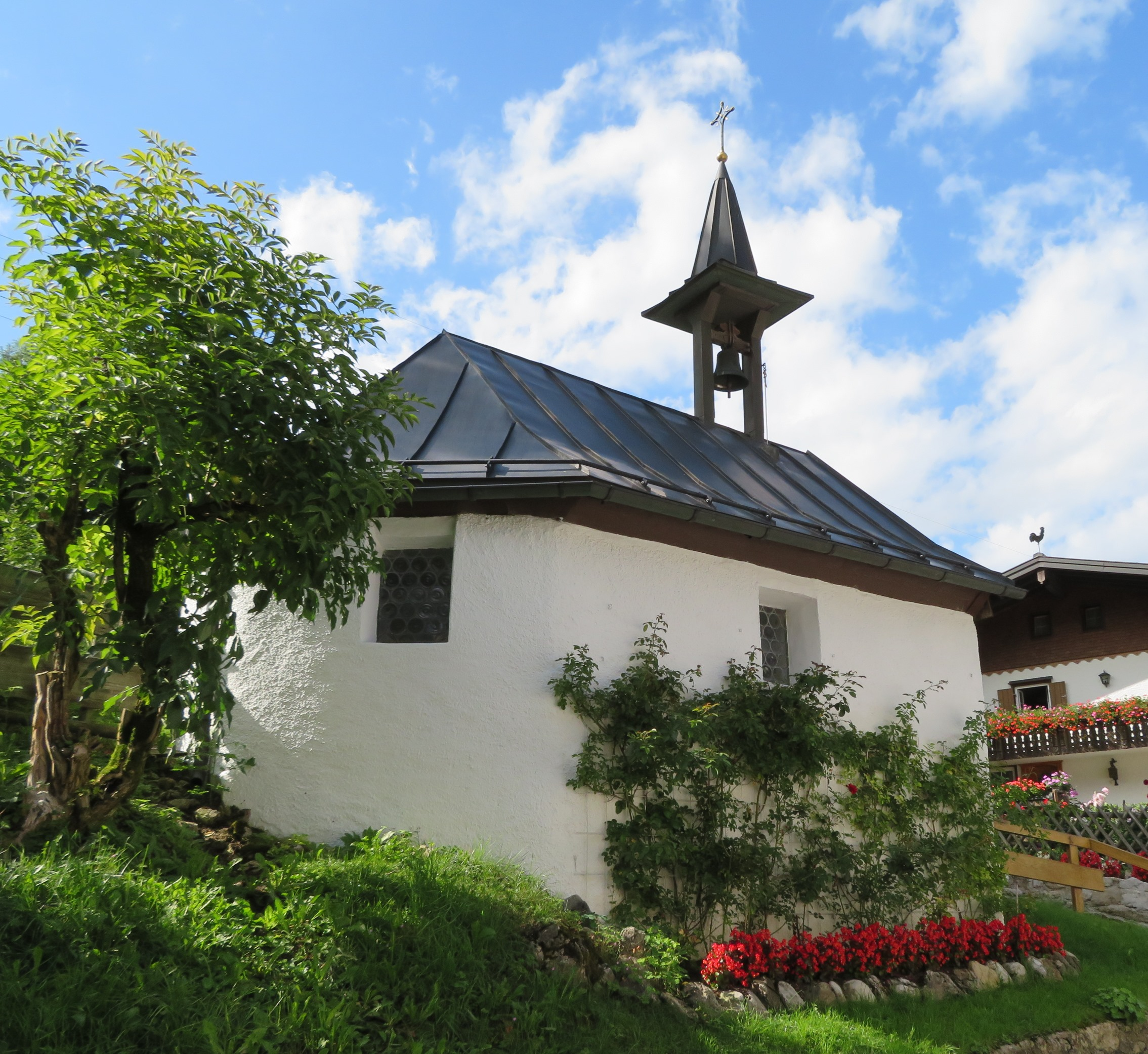 um 1720 erbaute Kapelle in Bruck